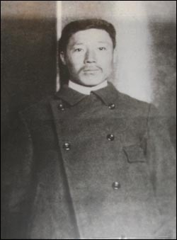 만주에서 의병활동 중 촬영한 안중근의 사진 (1908년)